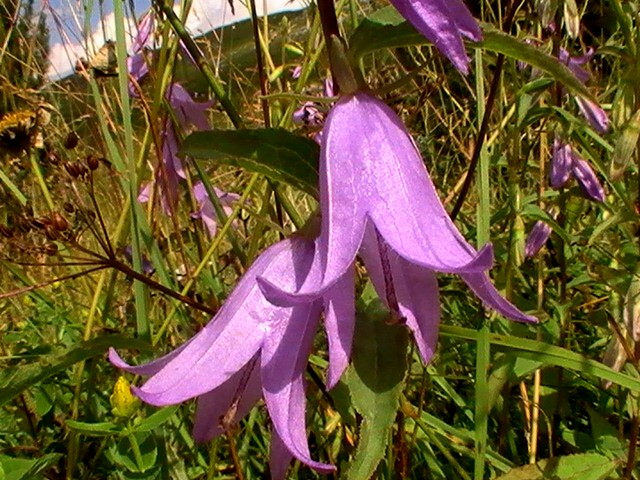 Campanula rapunculoides "Giardino Botanico delle Alpi Orientali", Monte Faverghera (BL), 1500 m s.l.m.